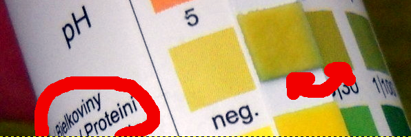 Zvýšená hodnota bílkovin v moči zjištěná pomocí testovacího proužku.